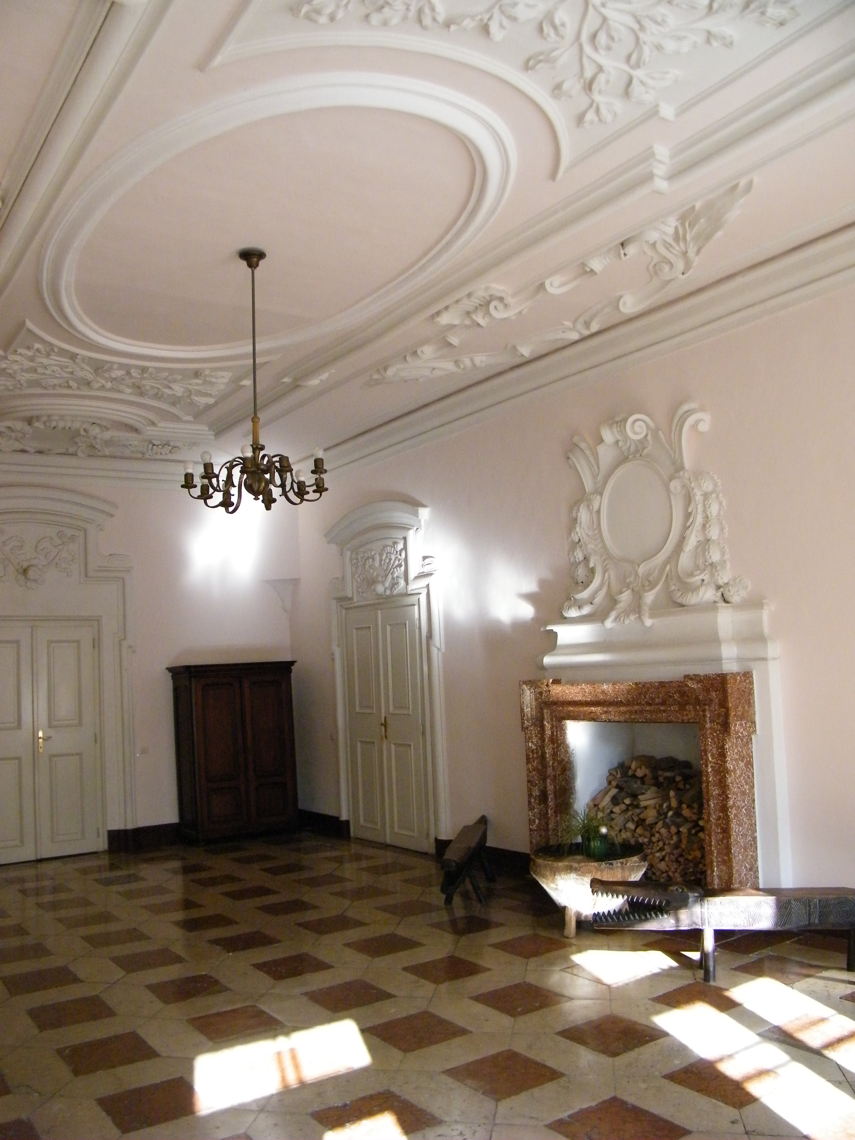 Salon Caspis-Schlössl